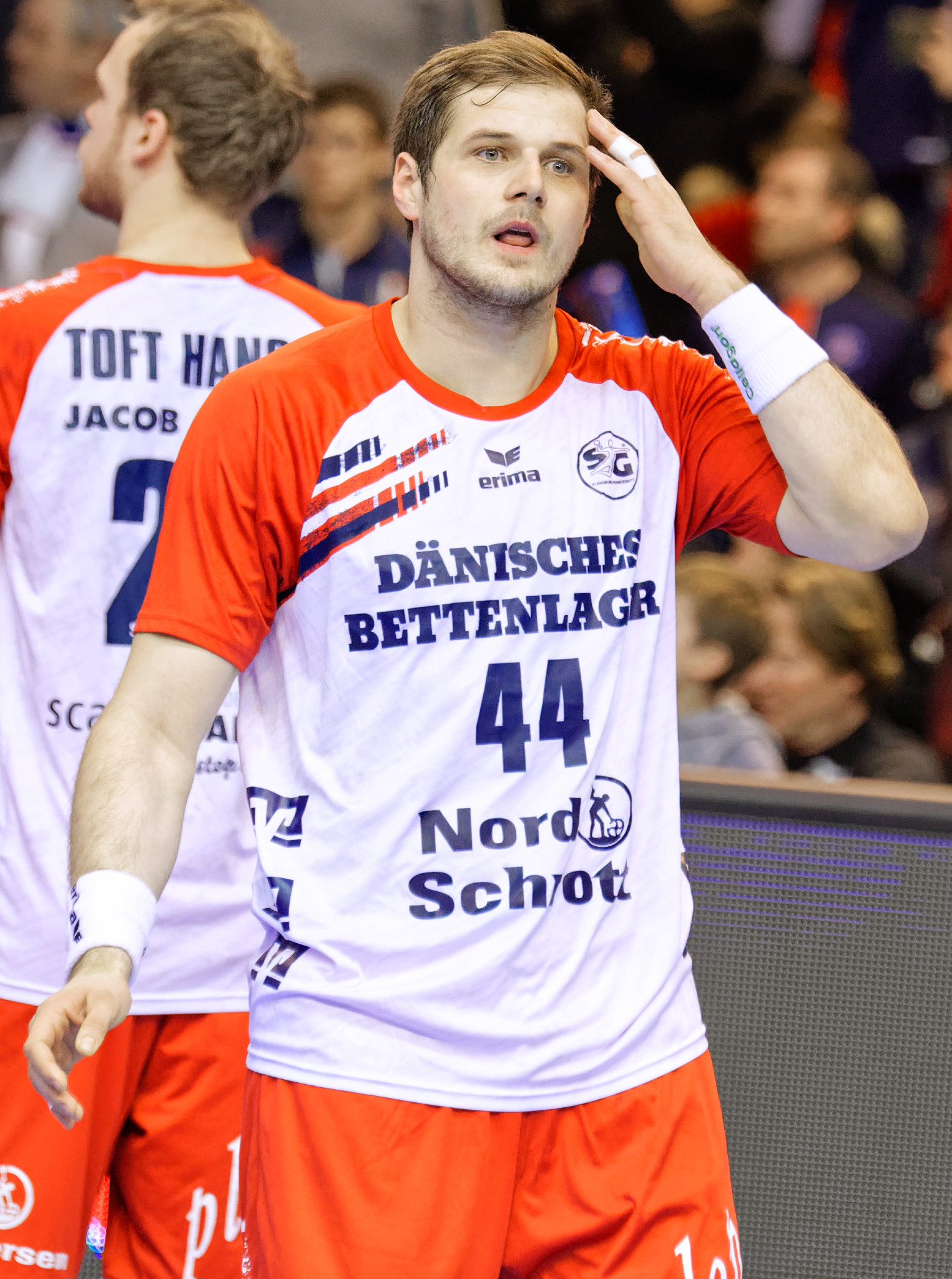 Rencontre de phase de groupe de la Ligue des Champions 2015-16 entre le PSG et SG Flensburg. A la Halle Carpentier (Paris), le 7 mars 2016.